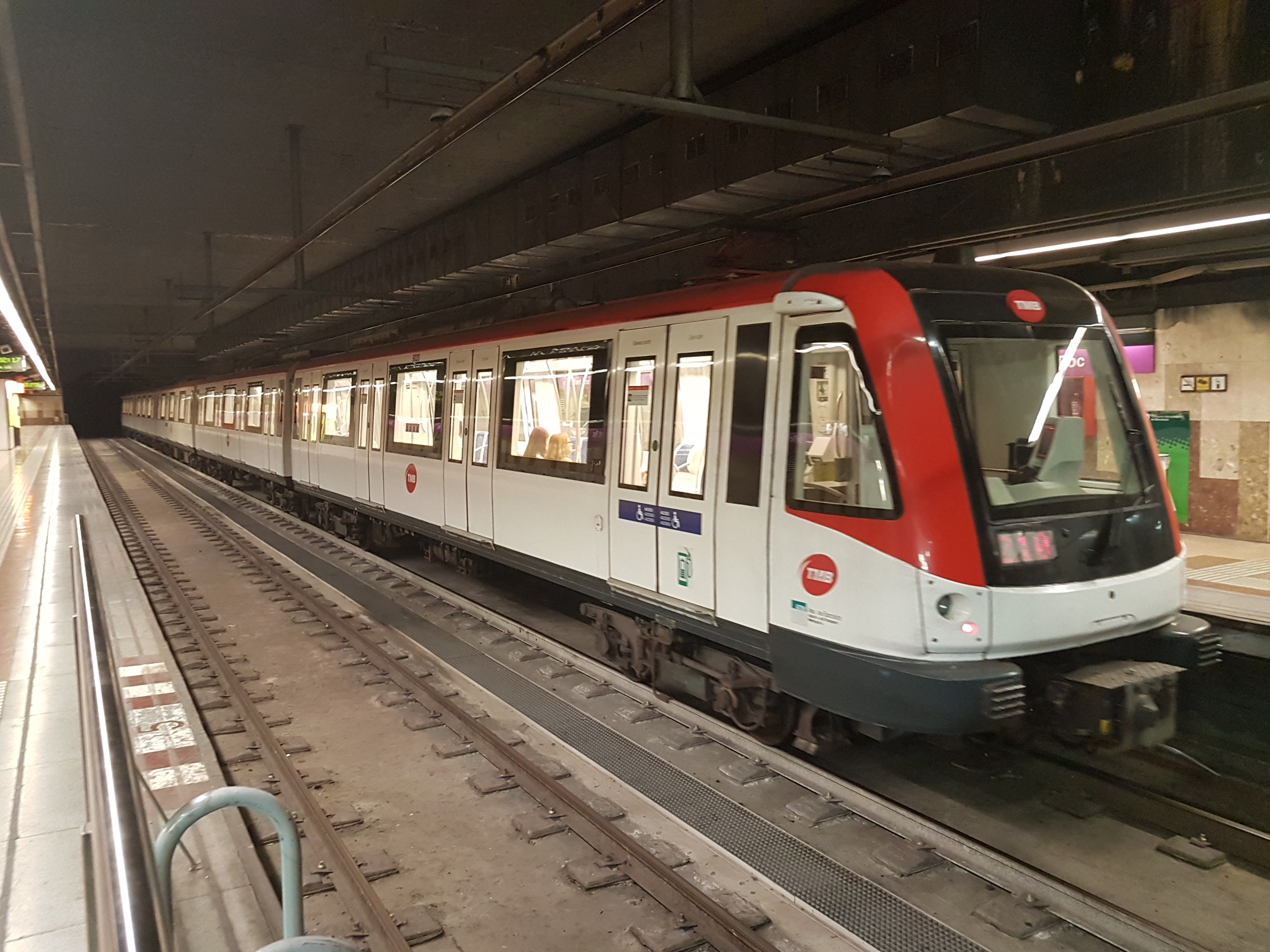 Unitat 9000 a l'estació de Sant Roc direcció Badalona de la línia 2 del metro de Barcelona